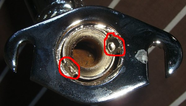 Drossel eines Sportauspuffes (Laser X-Pro)